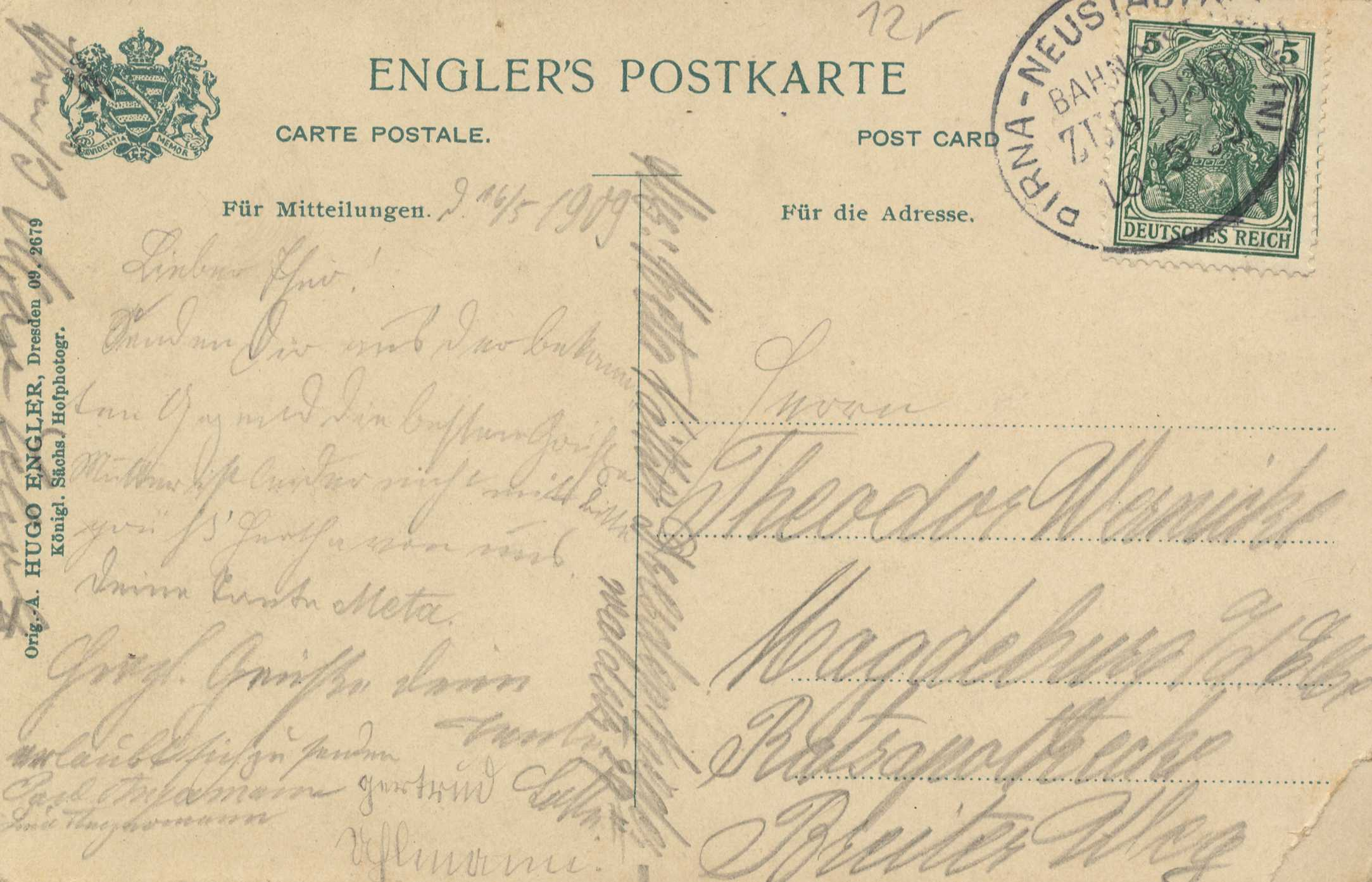 Schloss